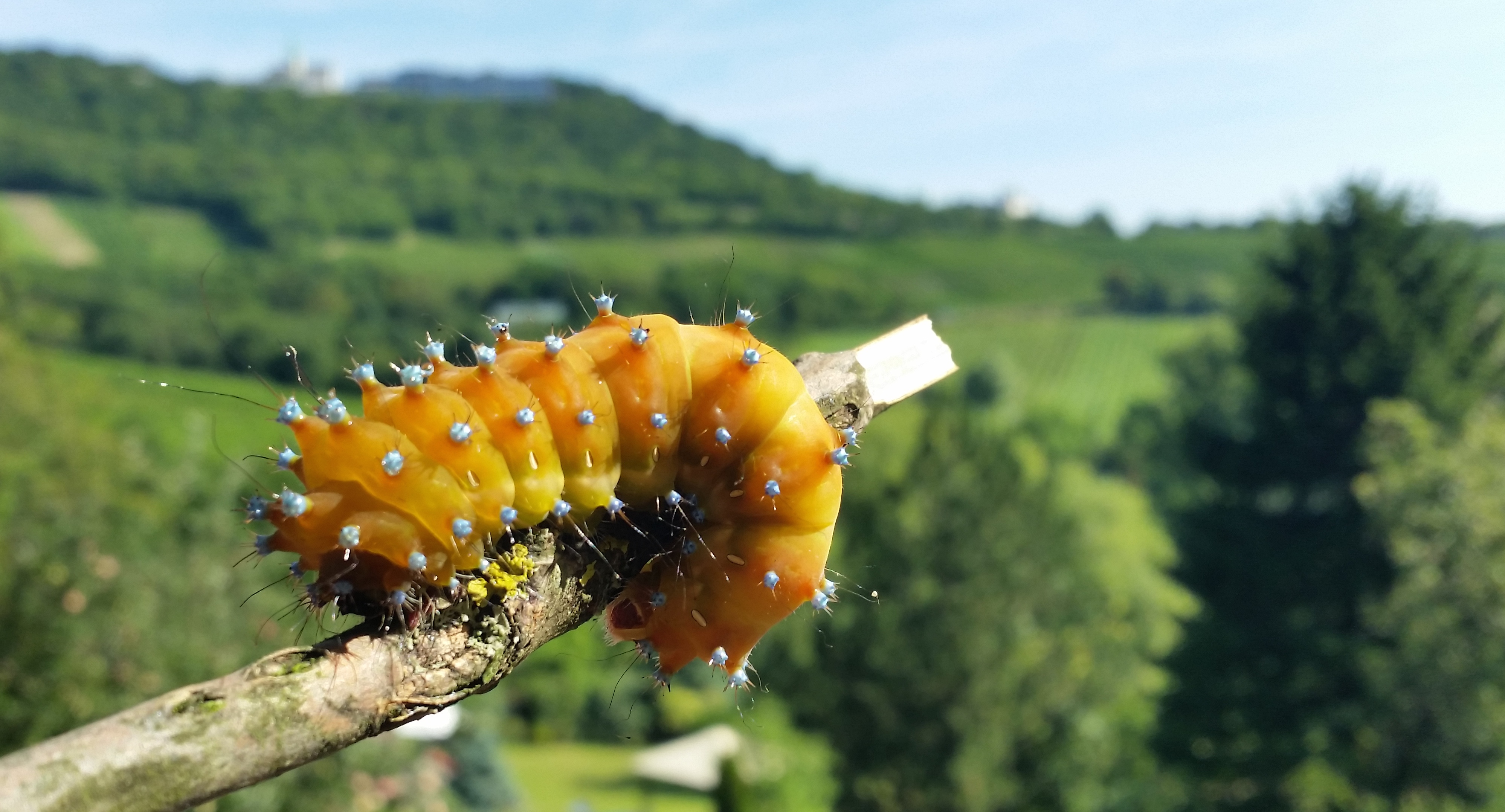 Raupe des Nachtpfauenauges